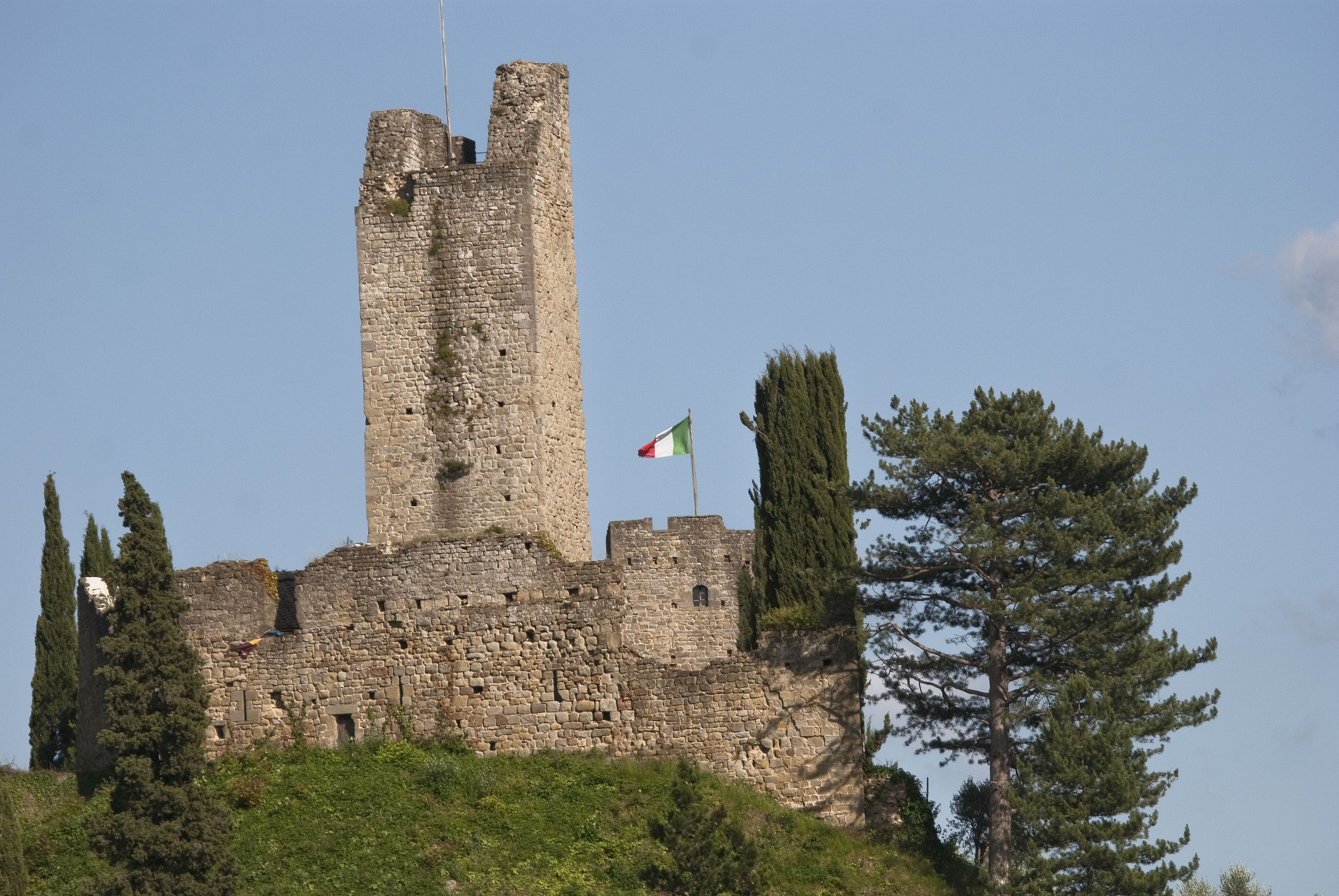 torre del Castello di Romena, Pratovecchio